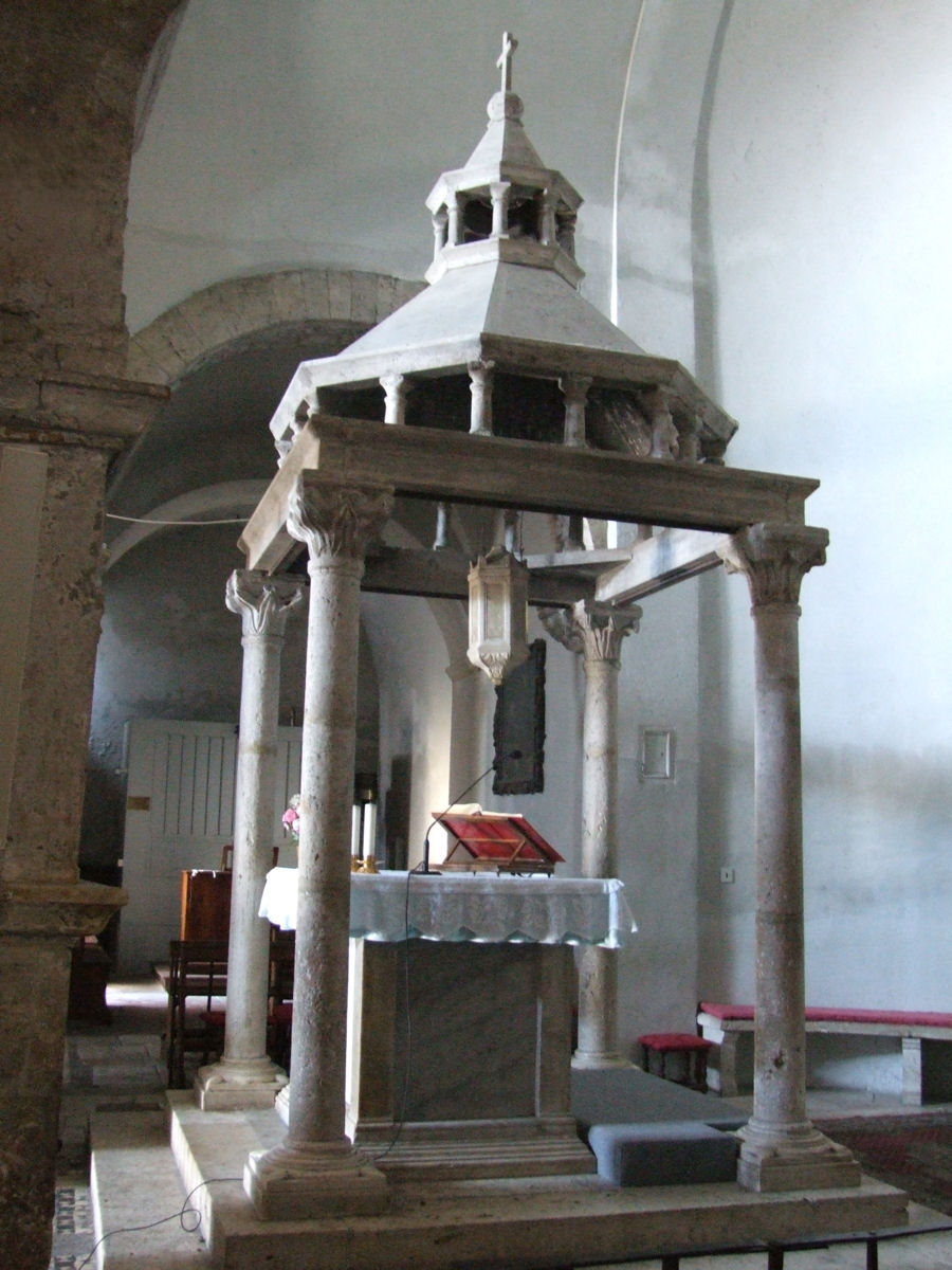 Santa Maria Assunta, Lugnano in Teverina, Italy - Cosmati